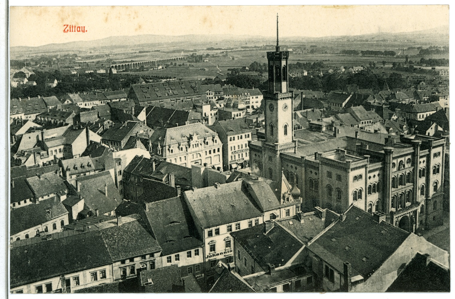 Zittau; Blick über die Stadt zum Rathaus This postcard is from publisher Brück & Sohn in Meißen ( This postcard has a unique number 05269 and is available in a higher resolution at the publisher. This images was uploaded in a cooperation project between Wikipedians and the publisher.